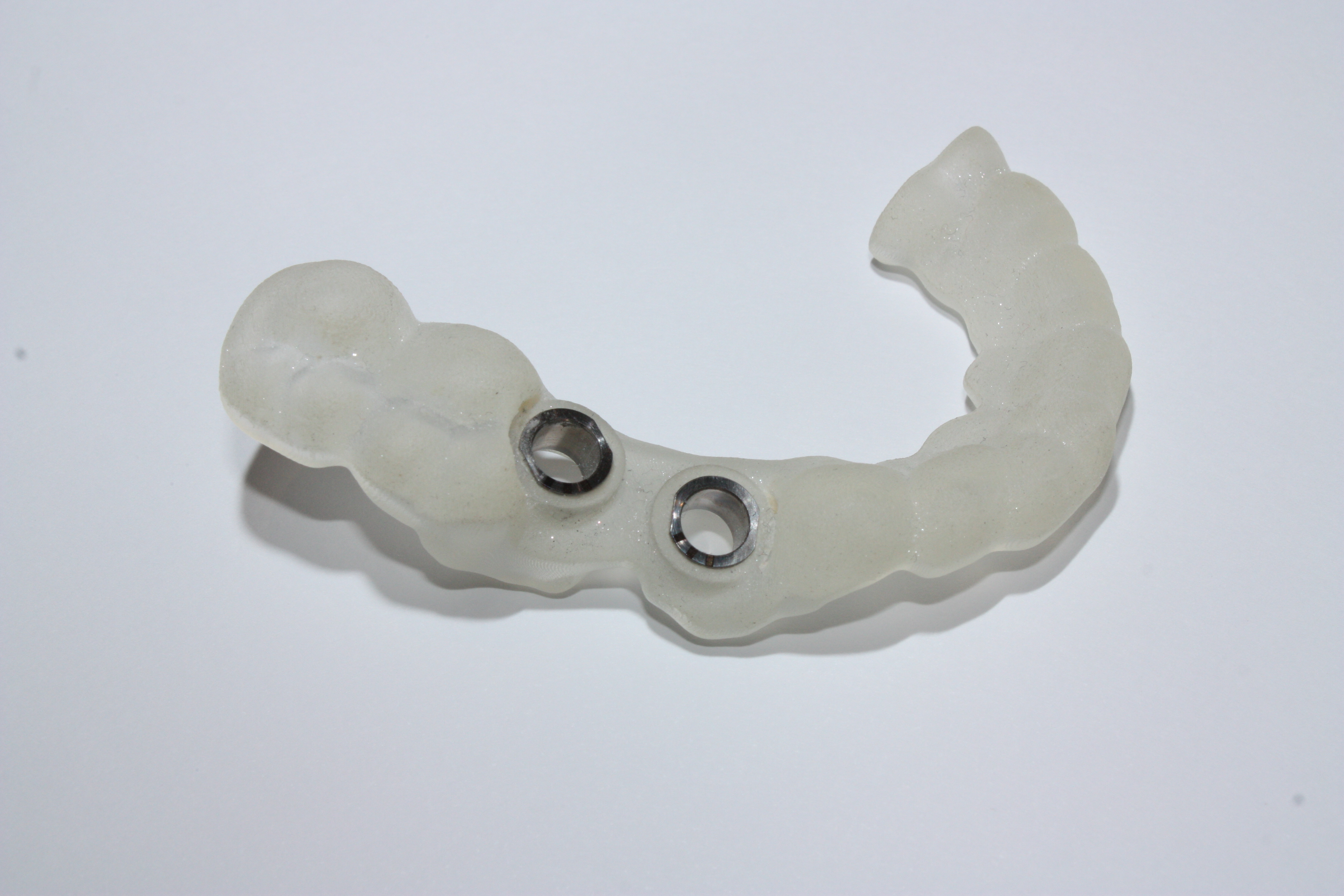 Eine Bohrschablone gewährleistet das präzise und sichere Einsetzen von Zahnimplantaten.